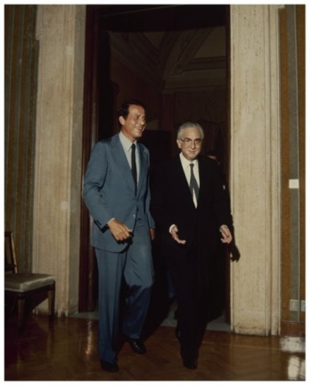 Il Presidente del Senato Francesco Cossiga in compagnia del giornalista Nuccio Fava